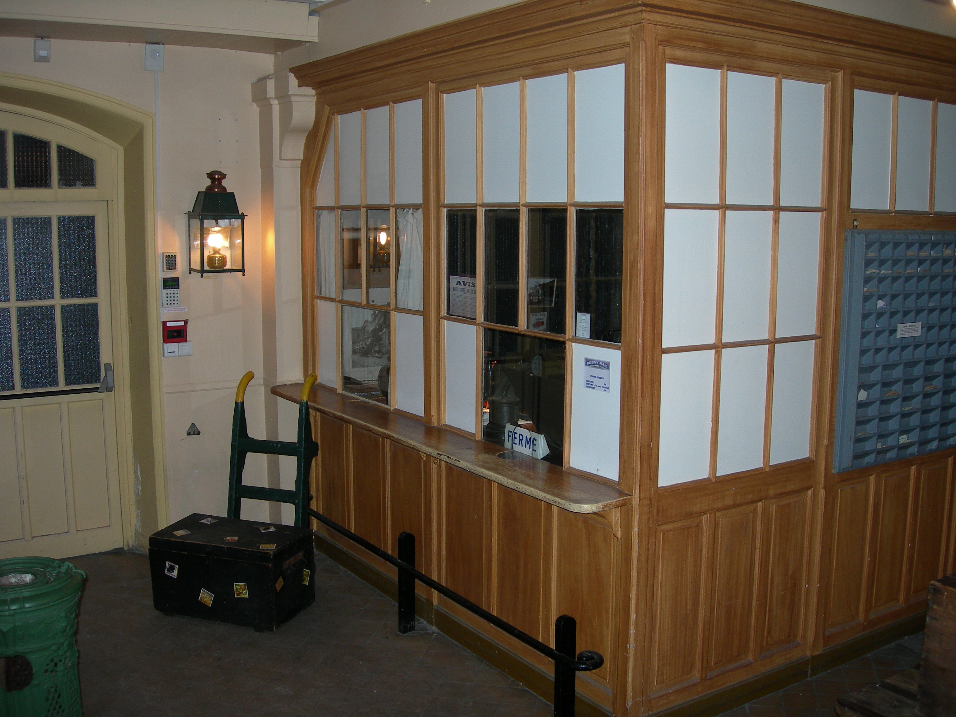 Le guichet